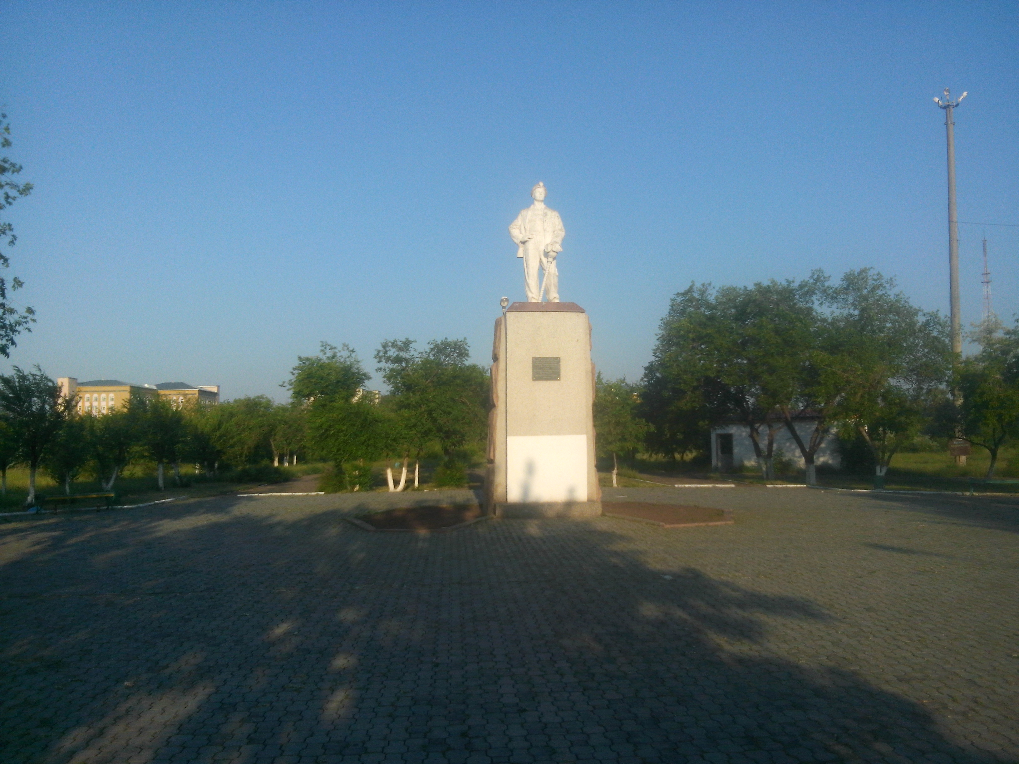 Памятник Шахтеру в городе Экибастуз